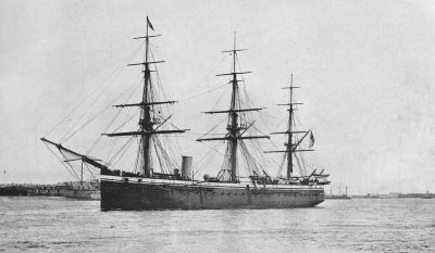 HMS Bacchante